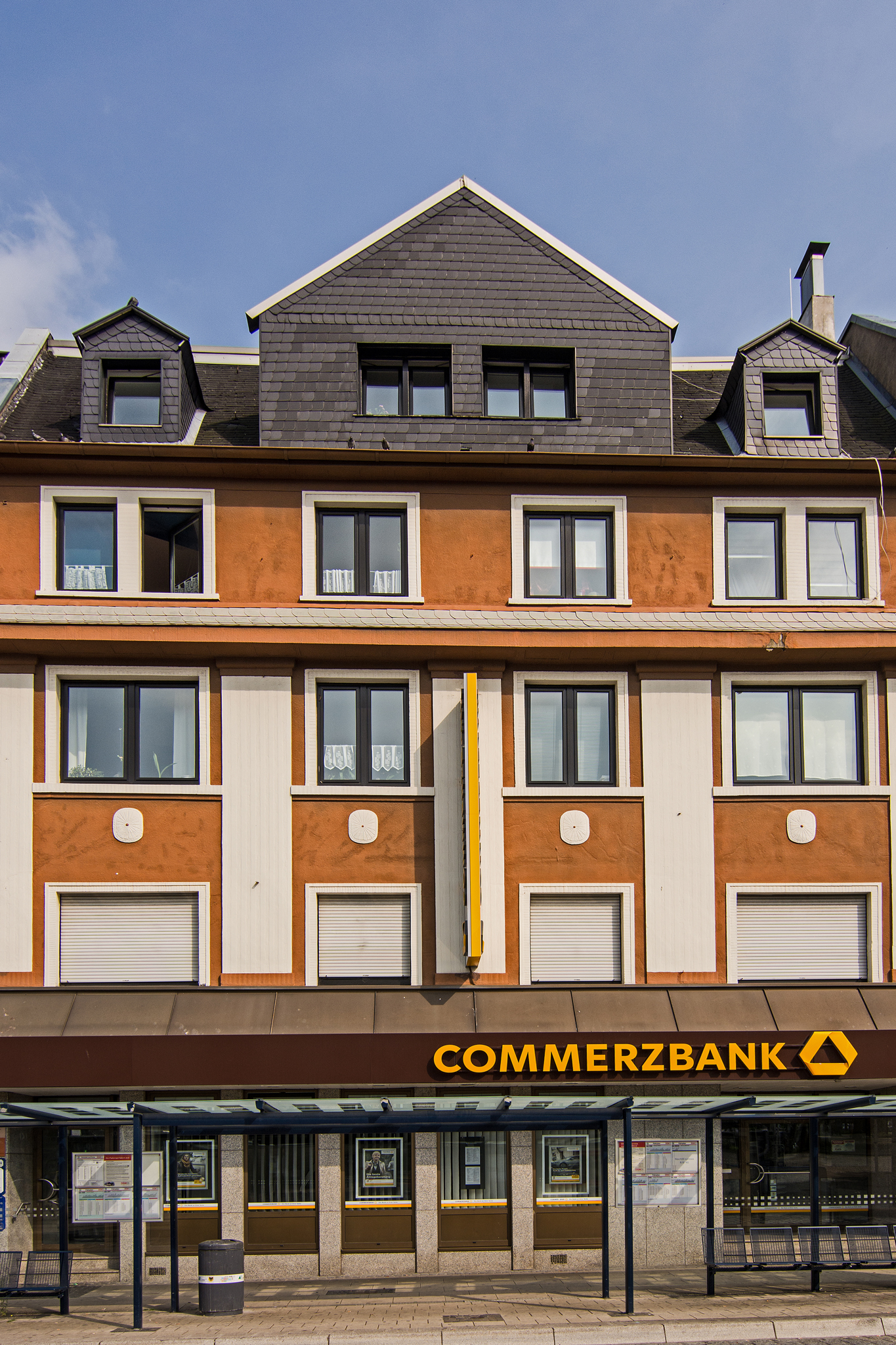 Wohnhaus eines Opfers des Naziterrors